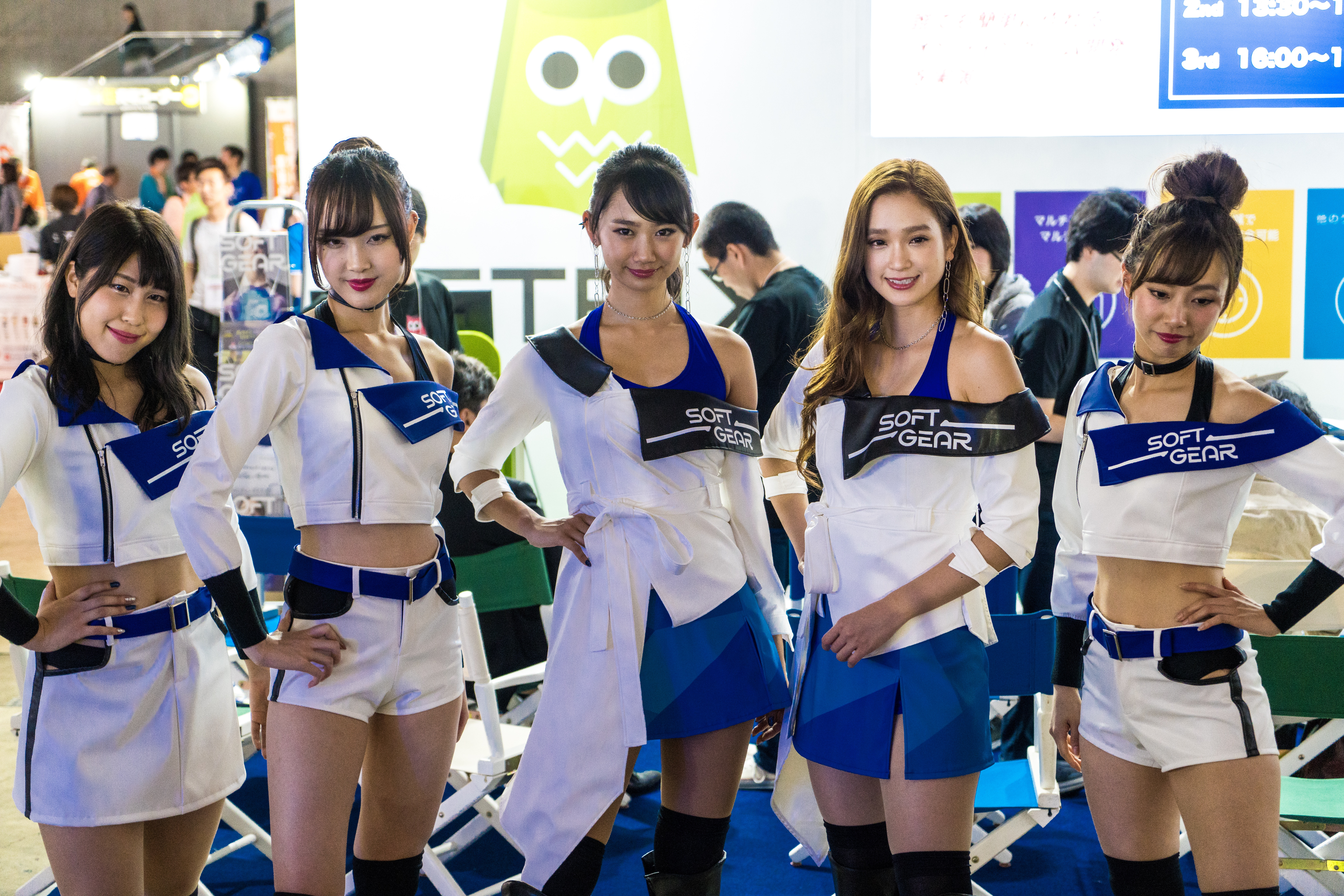 Tokyo Game Show 2018